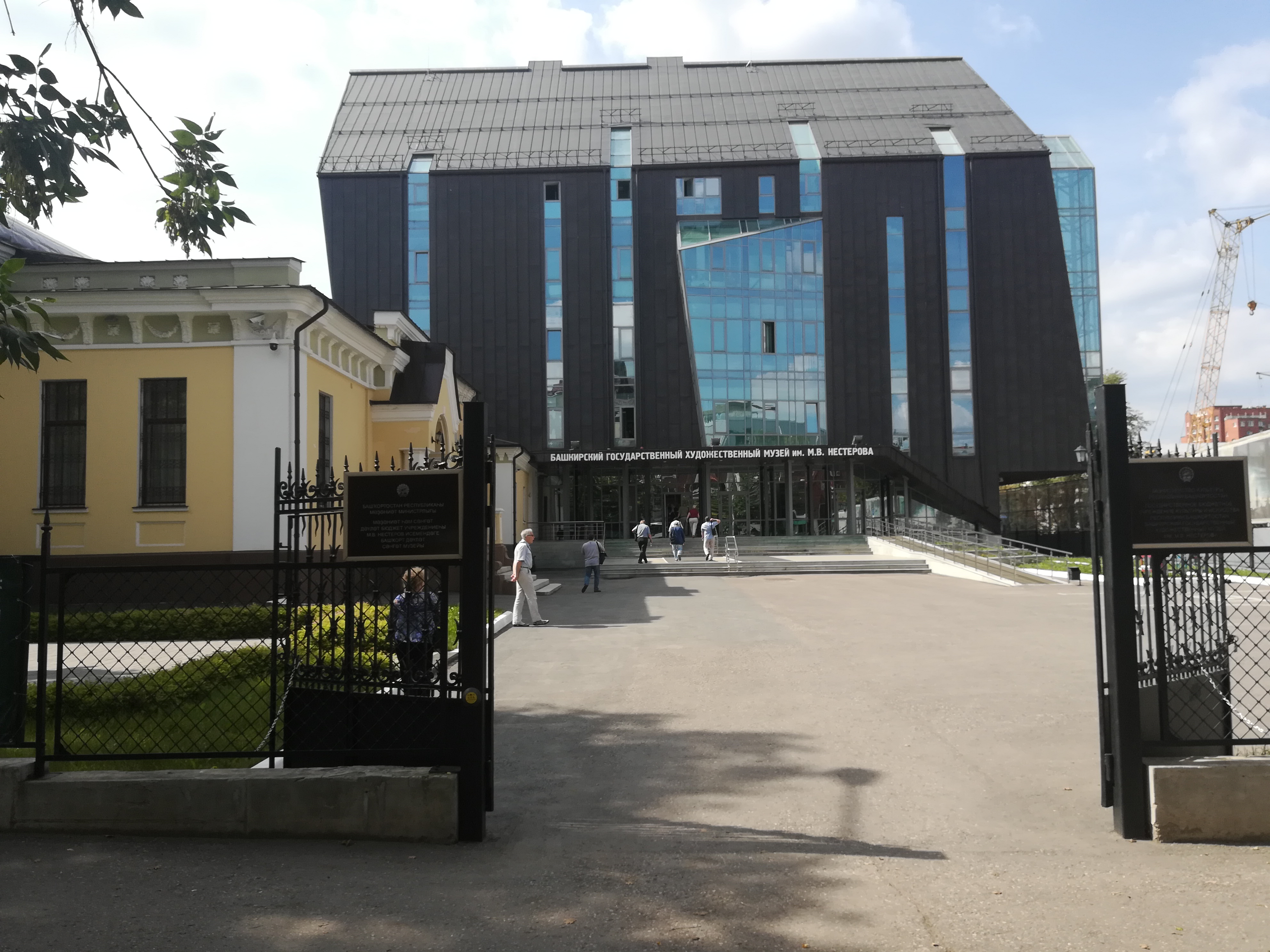 Музей